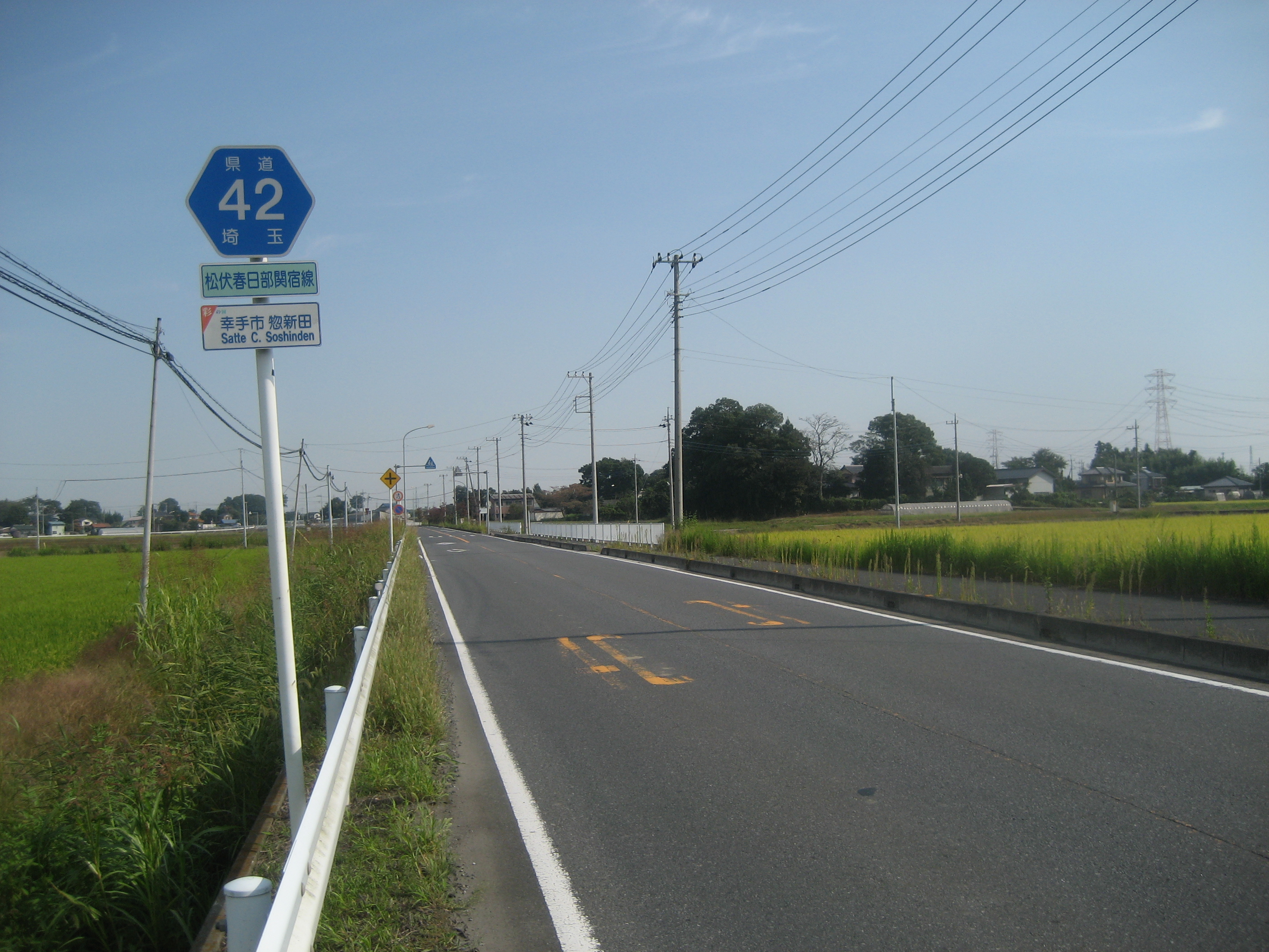 埼玉県道42号線幸手市惣新田付近（関宿橋方面を撮影）